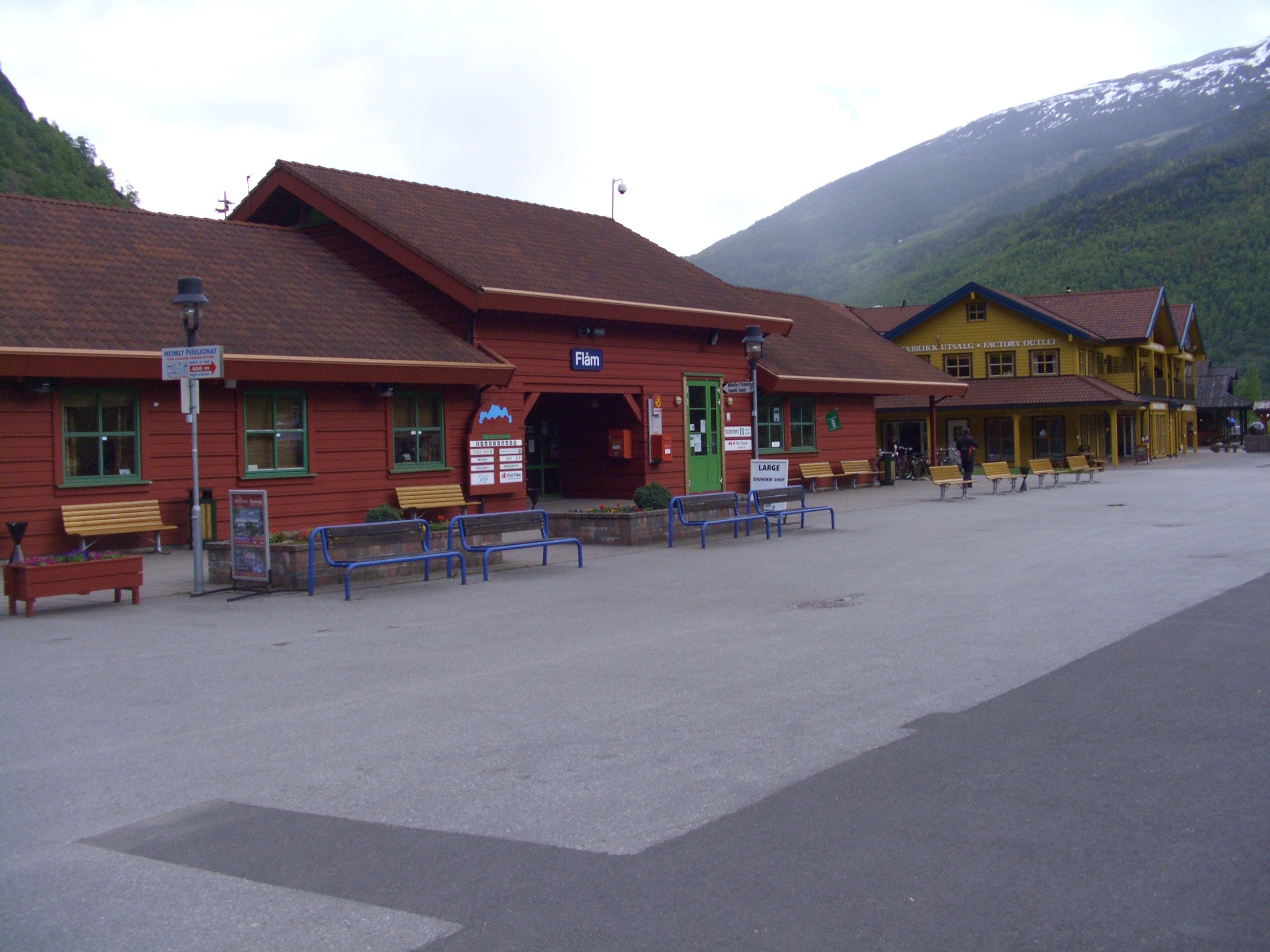 Flåm stasjon